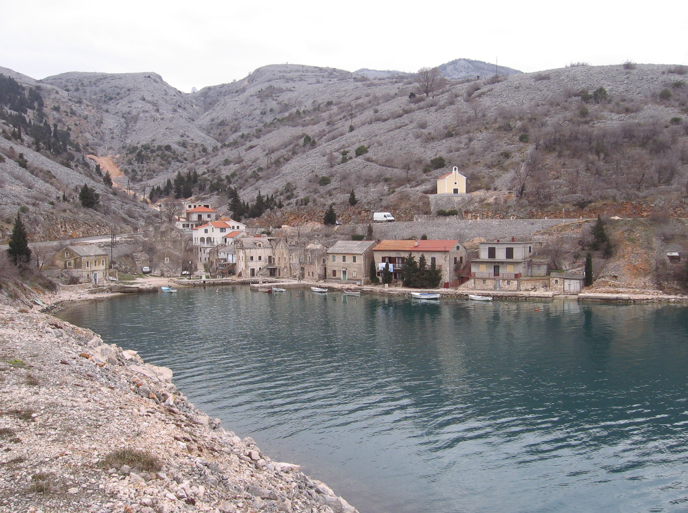 Naselje Tribanj, zaselak Lisarica, Dalmacija